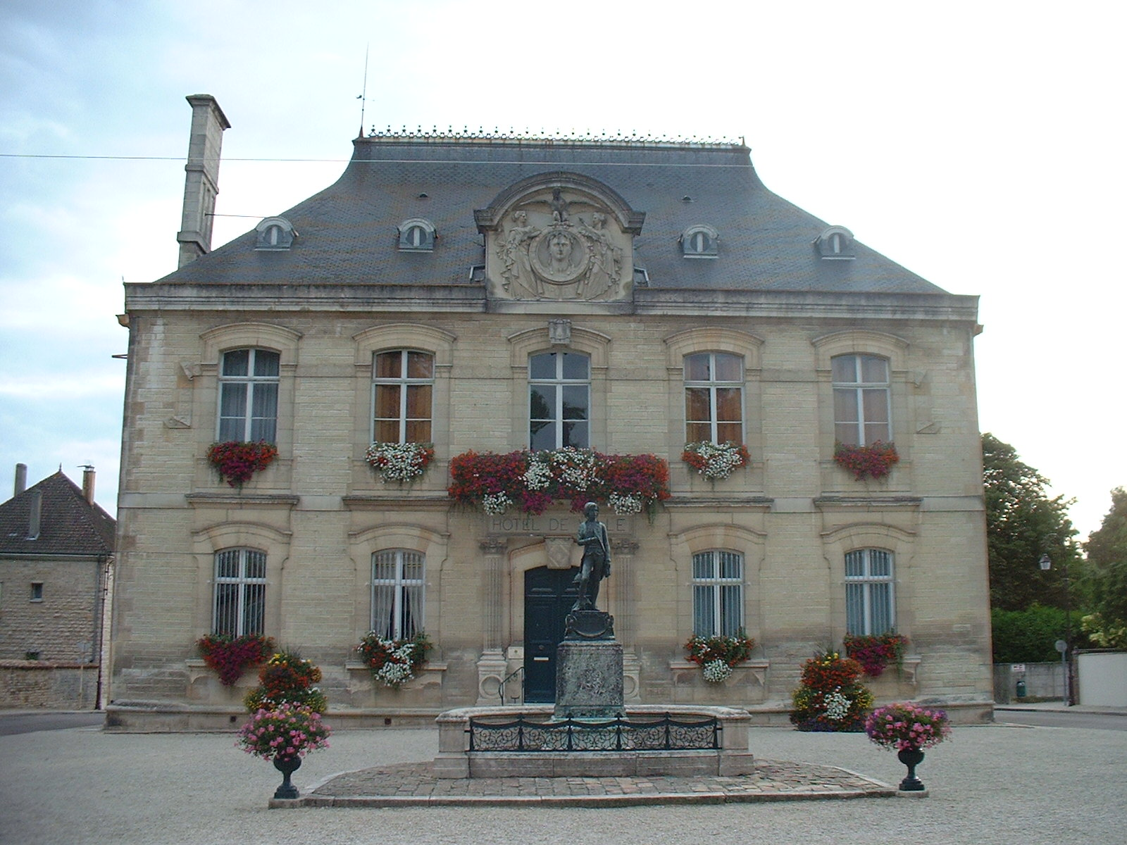 Vue de la mairie avec la statue de Bonaparte enfant